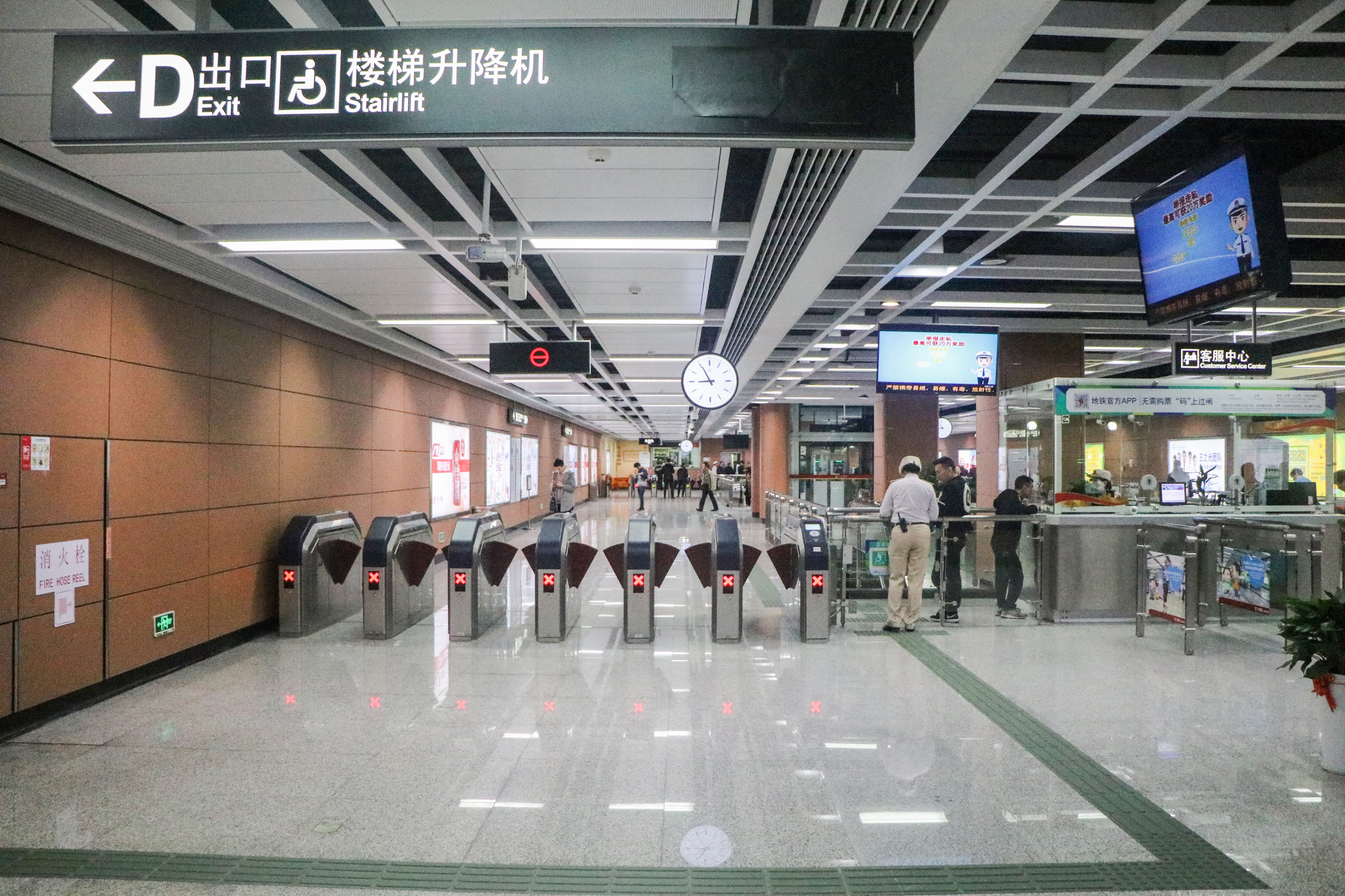 广州地铁石溪站